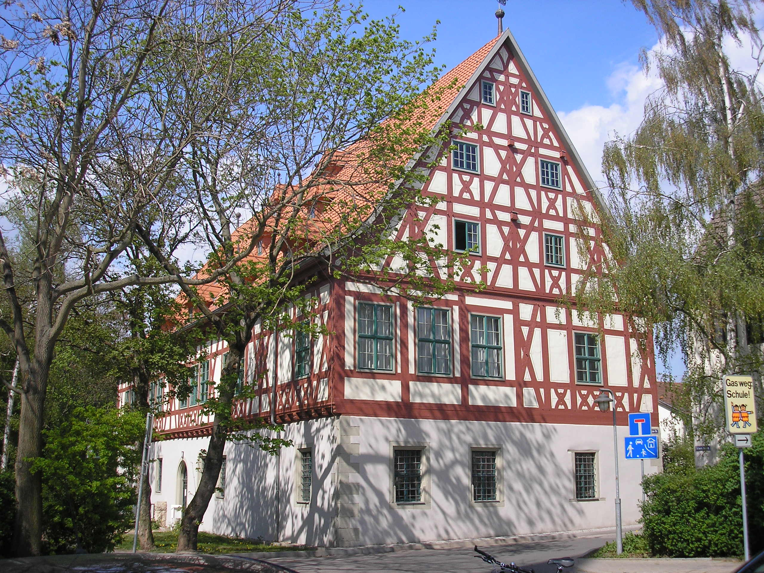 Das Pfarrhaus der Bonifatiuskirche in Sömmerda (Thüringen).